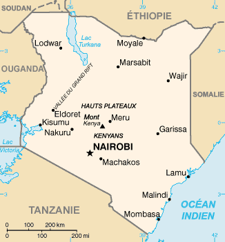 carte du Kenya